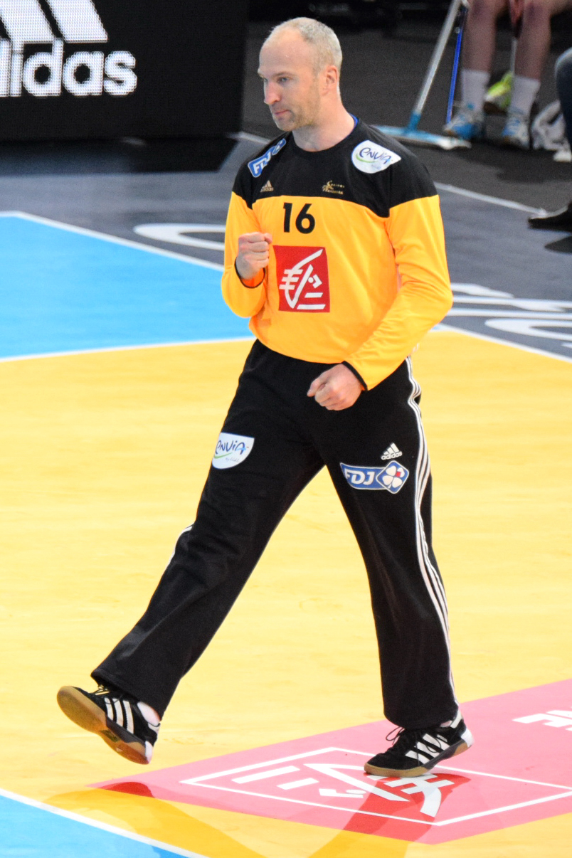 Le 10 janvier 2016 lors du match France / Danemark durant la Golden League à l'AccorHotels Arena (Paris).